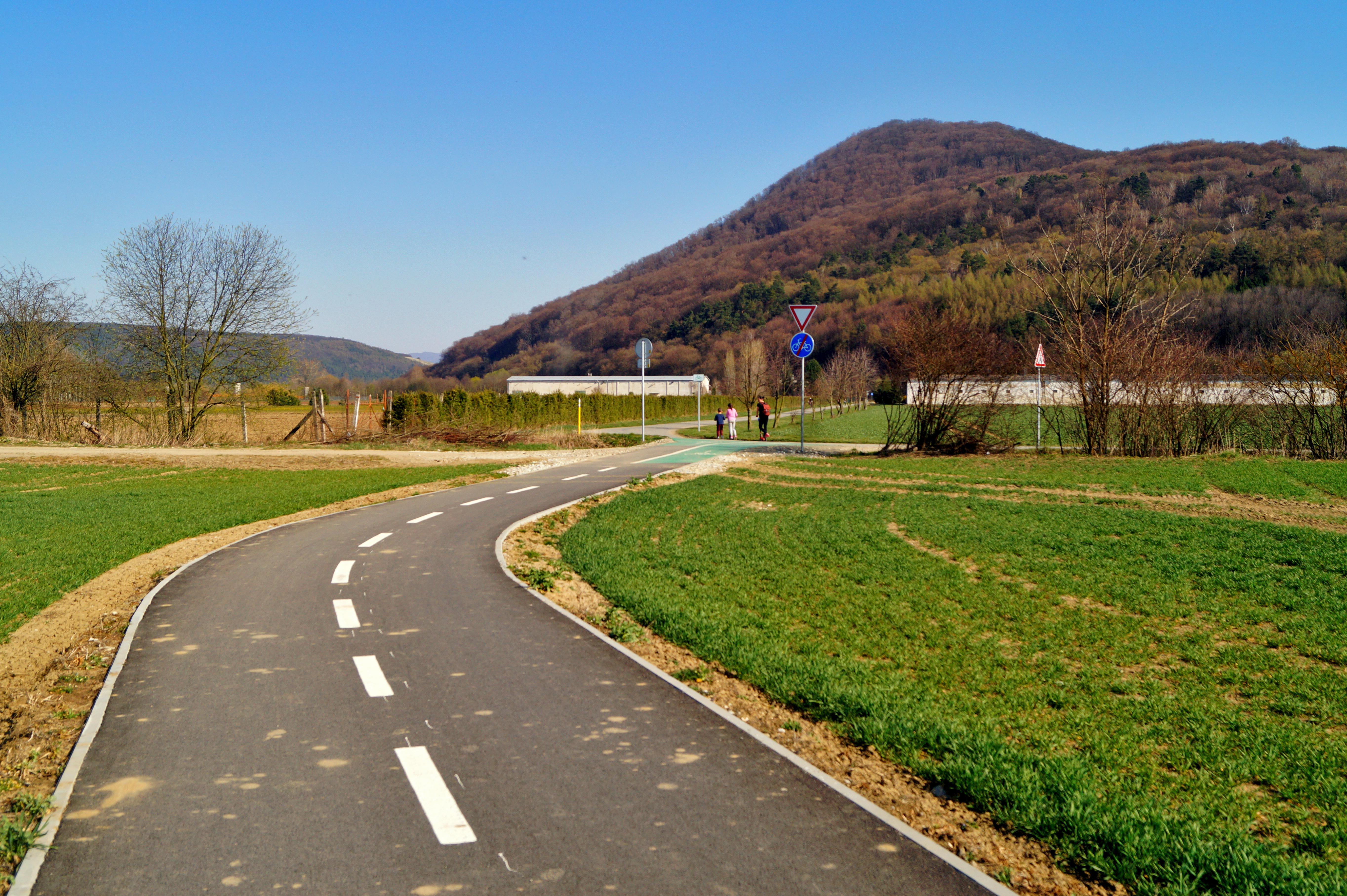 Medzinárodná cyklotrasa EuroVelo 11